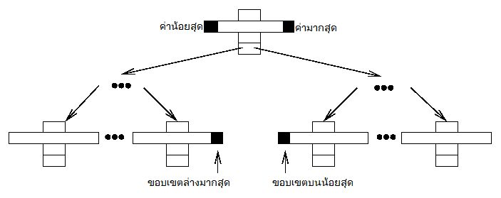 ค่าขอบเขตปมของต้นไม้แบบที